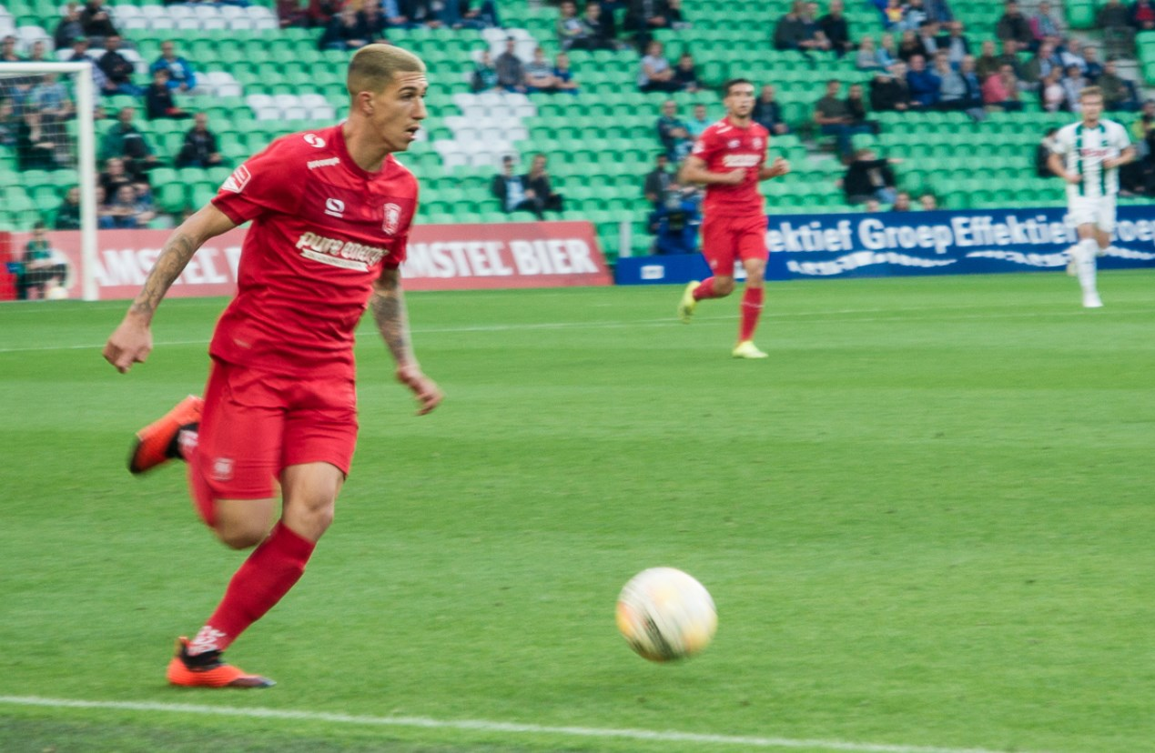 Aitor Cantalapiedra in de wedstrijd FC Groningen - FC Twente van 27 september 2018 (0-2)